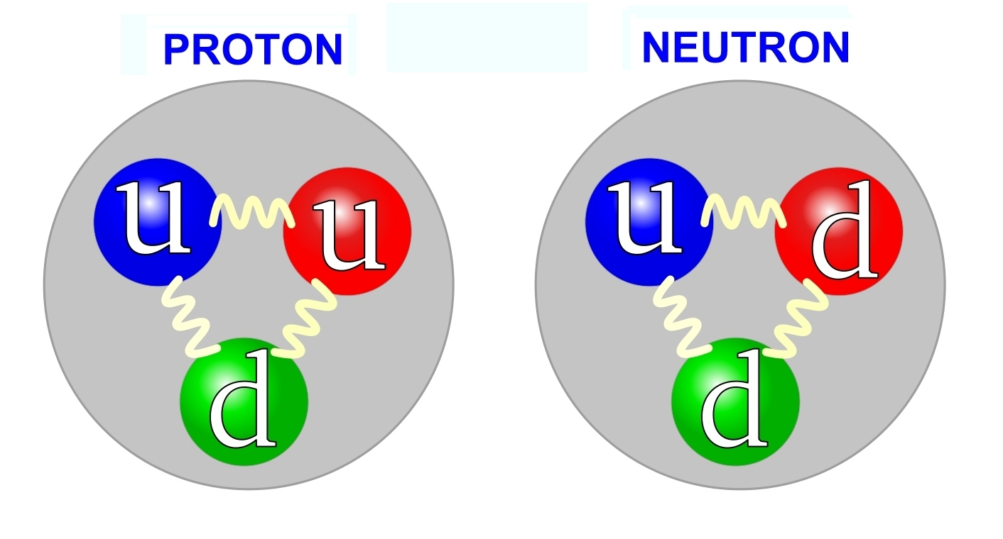 פרוטון וניוטרון